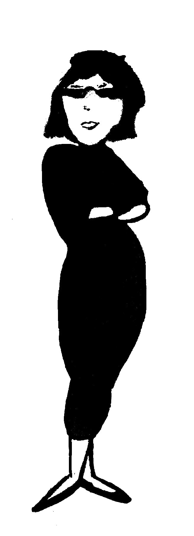 Beatnik stereotype. Beat girl